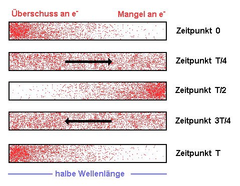 Momentanaufnahmen der Elektronendichte